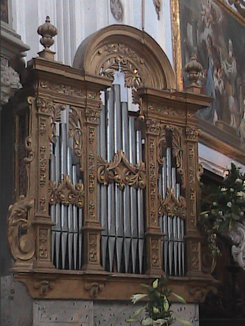 La cassa dell'organo barocco del Santuario della Santissima Annunziata in Gaeta (LT) nella sua vecchia sistemazione